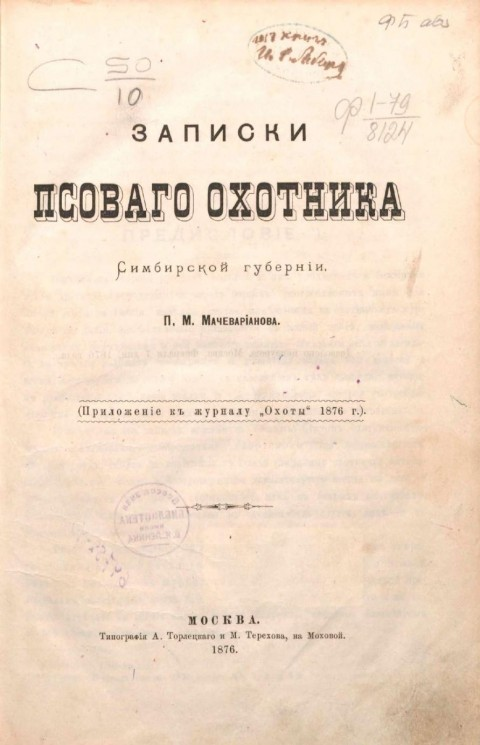 Титульный лист первого издания книги "Записки псового охотника Симбирской губернии" П. М, Мачеварианова